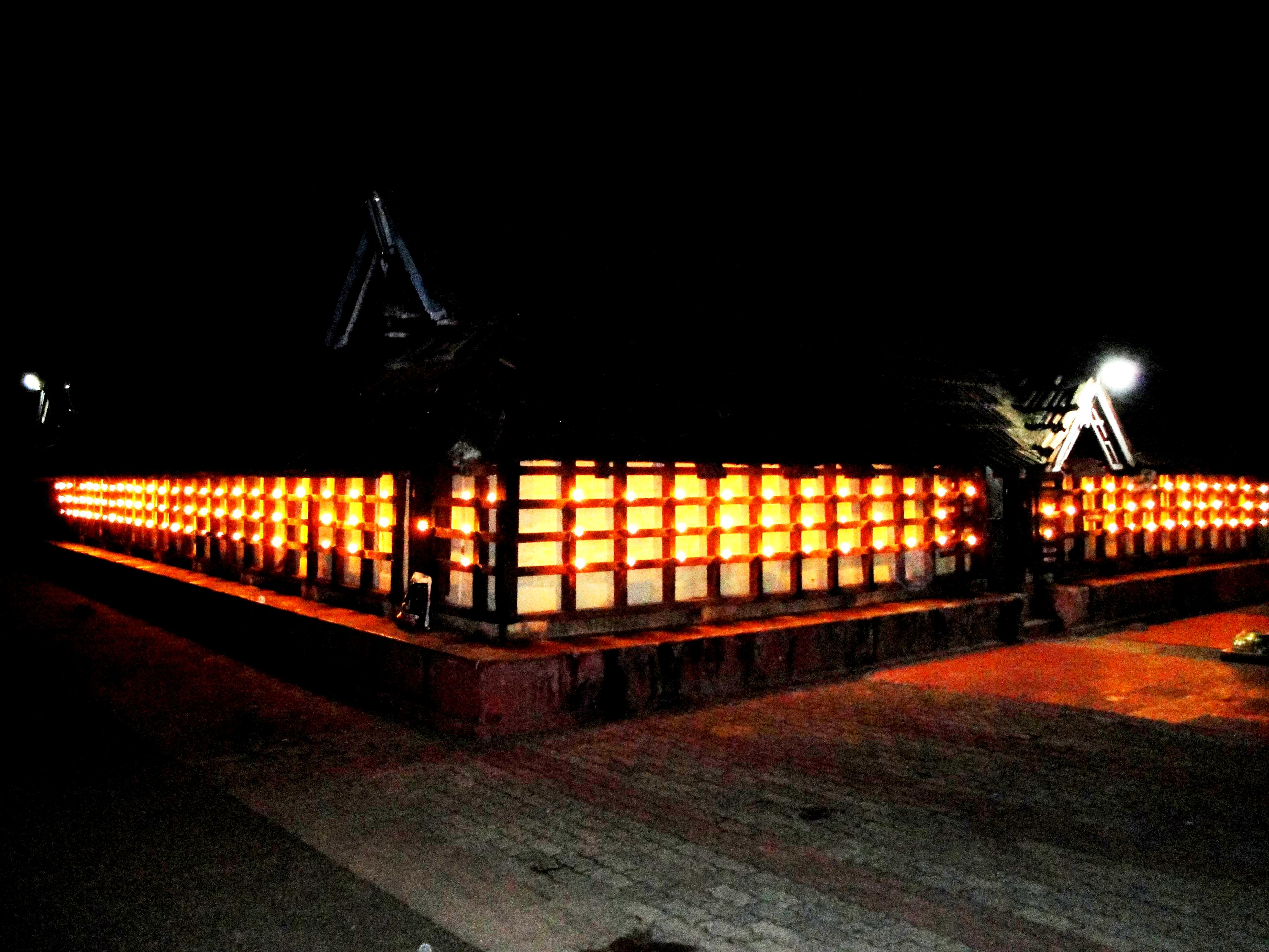 == അനുമതി ==